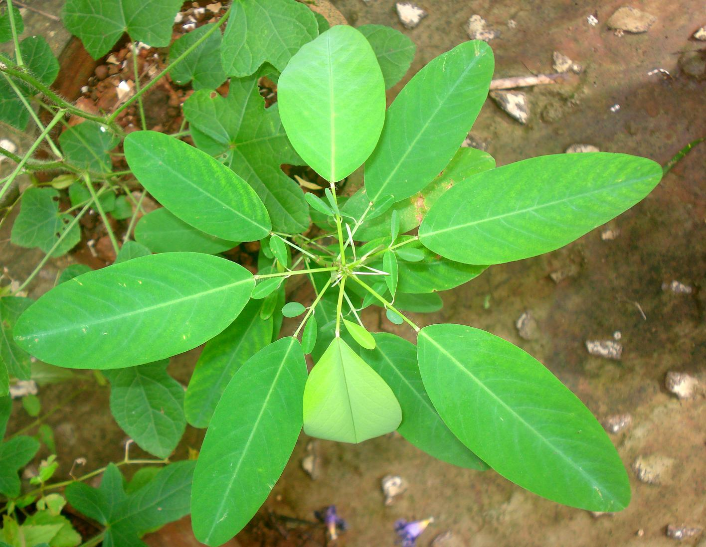 തൊഴുകണ്ണി Name : Desmodium gyrans Family : Fabaceae തൊഴുകണ്ണിയുടെ ഇലകൾ ഘടികാരത്തിലെ സൂചി ചലിക്കുന്നതു പോലെ എപ്പോഴും ചലിച്ചുകൊണ്ടിരിക്കാറുണ്ട്. ചെടിയുടെ തണ്ടിലെ രണ്ട് ചെറിയ ഇലകളാണു് എപ്പോഴും വിടരുകയും, കൂമ്പുകയും ചെയ്തുകൊണ്ടിരിക്കുക. ഇതിന്റെ വേരു് സിദ്ധവൈദ്യത്തിൽ വിഷചികിത്സയ്ക്കു് ഉപയോഗിക്കാറുണ്ടു്. പാമ്പിൻവിഷത്തെ ഇതു് ഫലപ്രദമായി പ്രതിരോധിക്കുന്നു. മുറിവും ചതവും ഭേദമാക്കാൻ ഇതിന്റെ വേരു് അരച്ചെടുത്തു് ഉപയോഗിക്കാറുണ്ടു്.